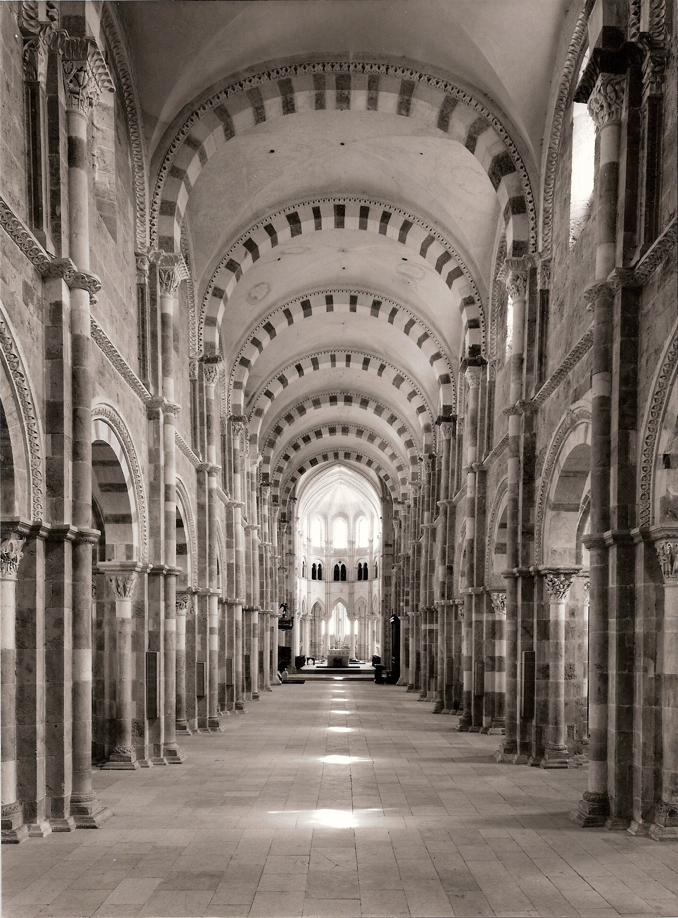 Le 23 juin 1976 à 14:27 dans la nef de la basilique Sainte-Marie-Madeleine de Vézelay, le Père Hugues Delautre o.f.m. a donné rendez-vous au soleil, à cet instant précis en culmination par rapport à la terre, pour qu'il lui manifeste le secret de l'édifice. Photographie de François Walch.